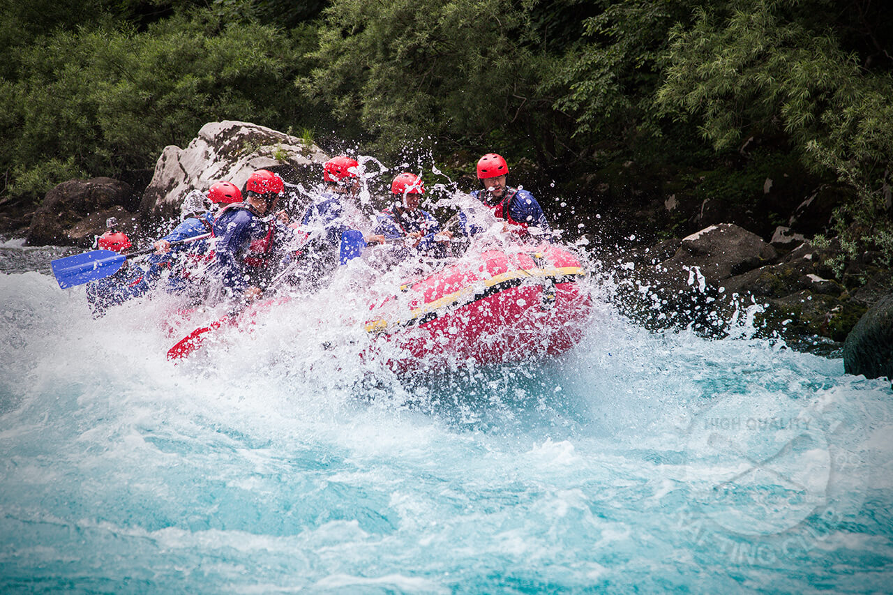 Rafting na rijeci Tari u Bosni i Hercegovini